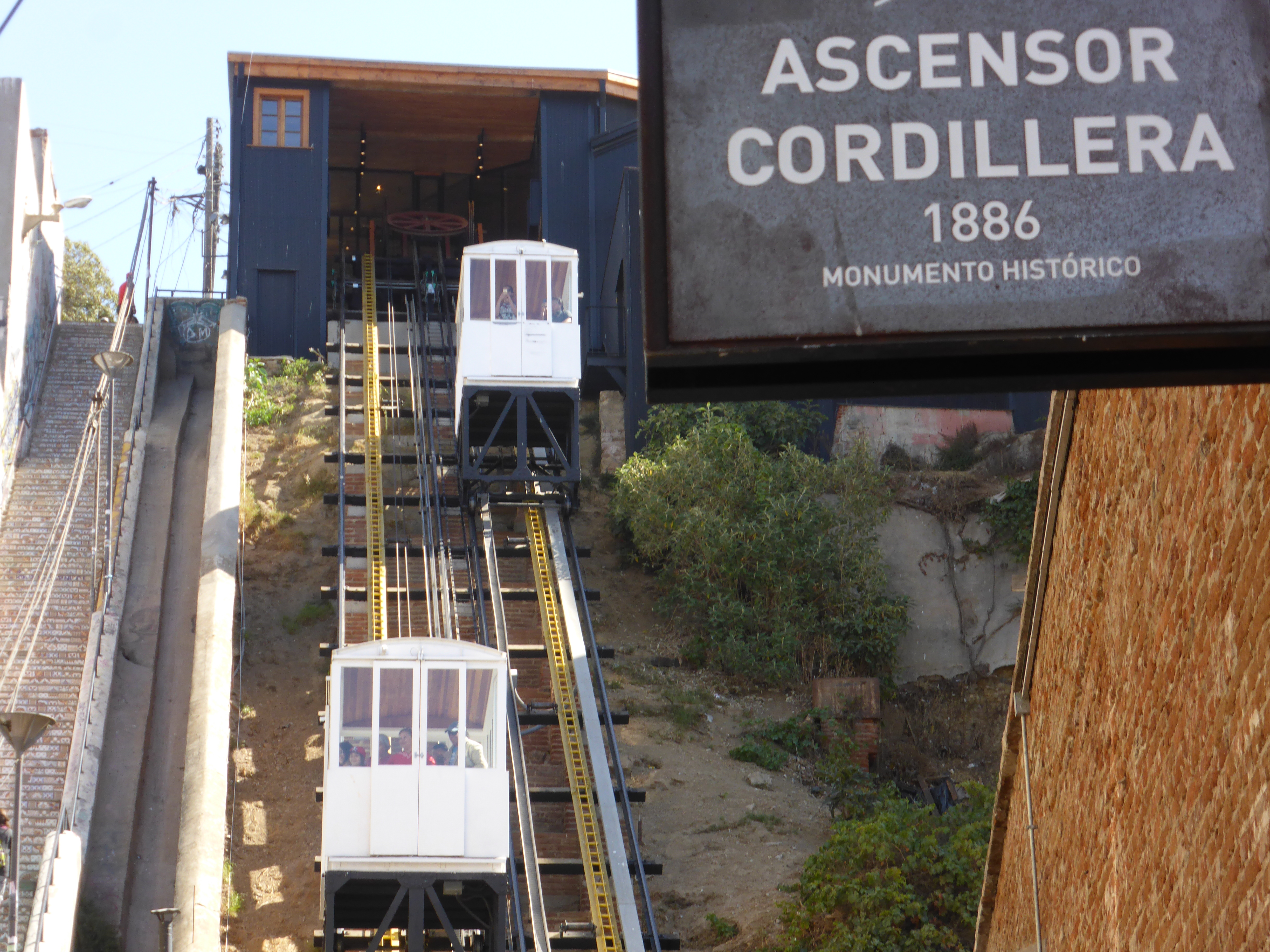 El ascensor Cordillera fue el segundo funicular que se inauguró en Valparaíso. En 2019 volvió a estar funcionando, tras su restauración (que duró un par de años).